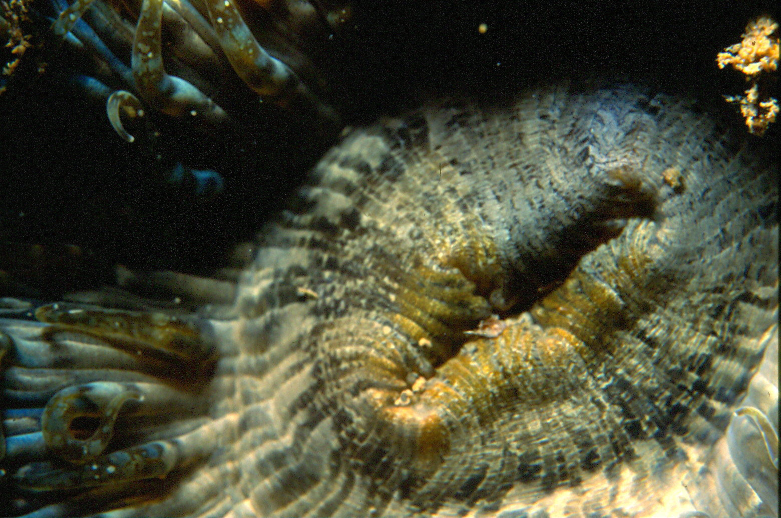 Macro-photographie de la bouche d'Aiptasia mutabilis